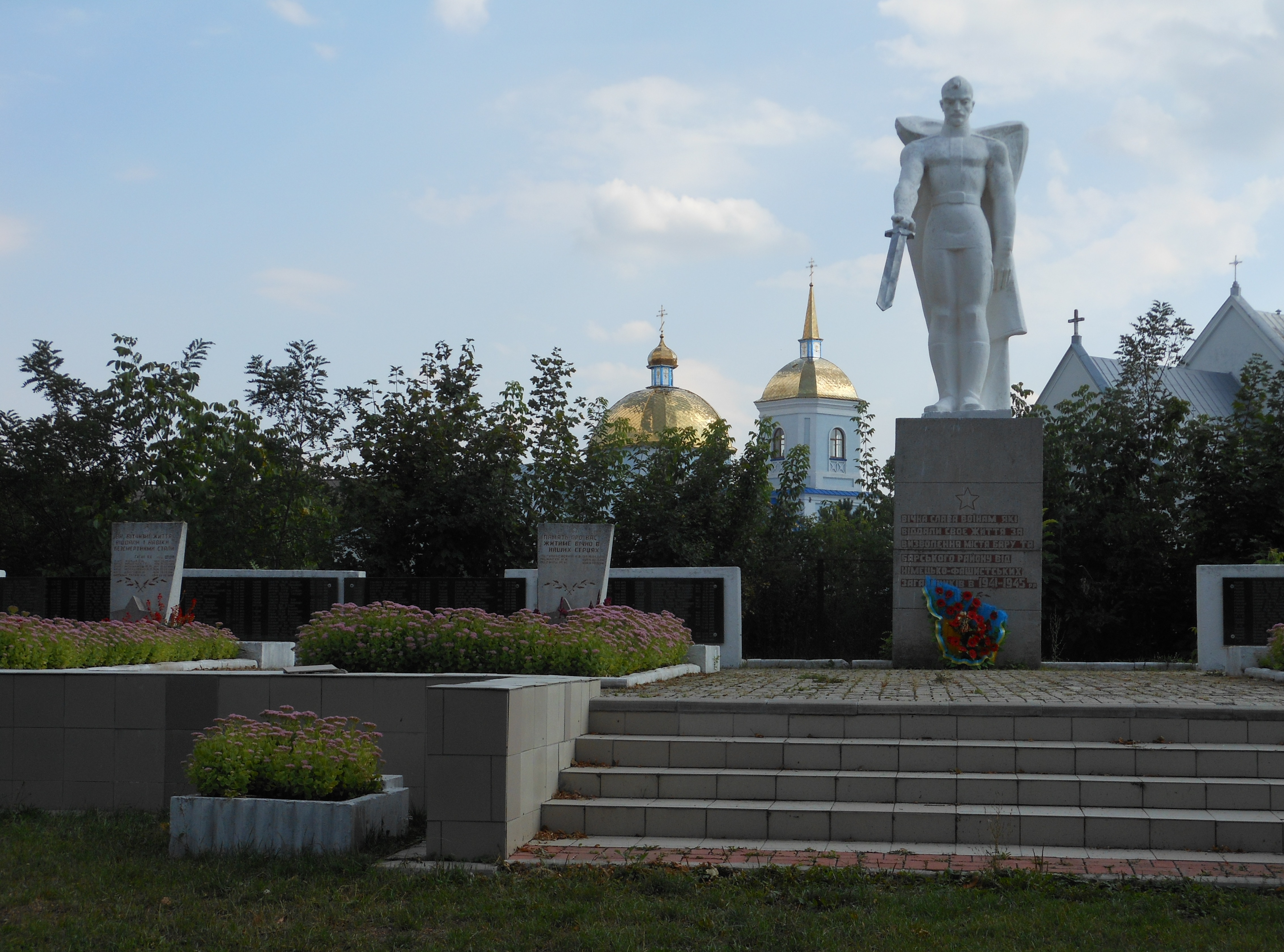 Братська могила 474 учасників громадянської війни і 453 воїнів Радянської Армії, загиблих при звільненні міста, Бар, вул. Буняковського (колишня вул. Горького)